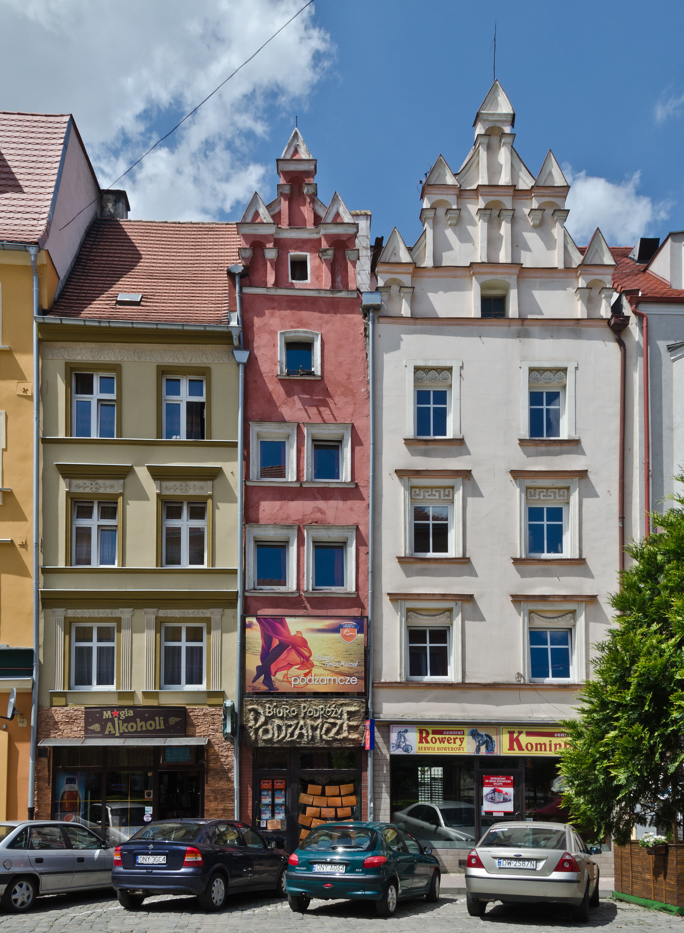 Nysa, Stare Miasto, kamienice nr 38, 57 i 56 przy Rynku.